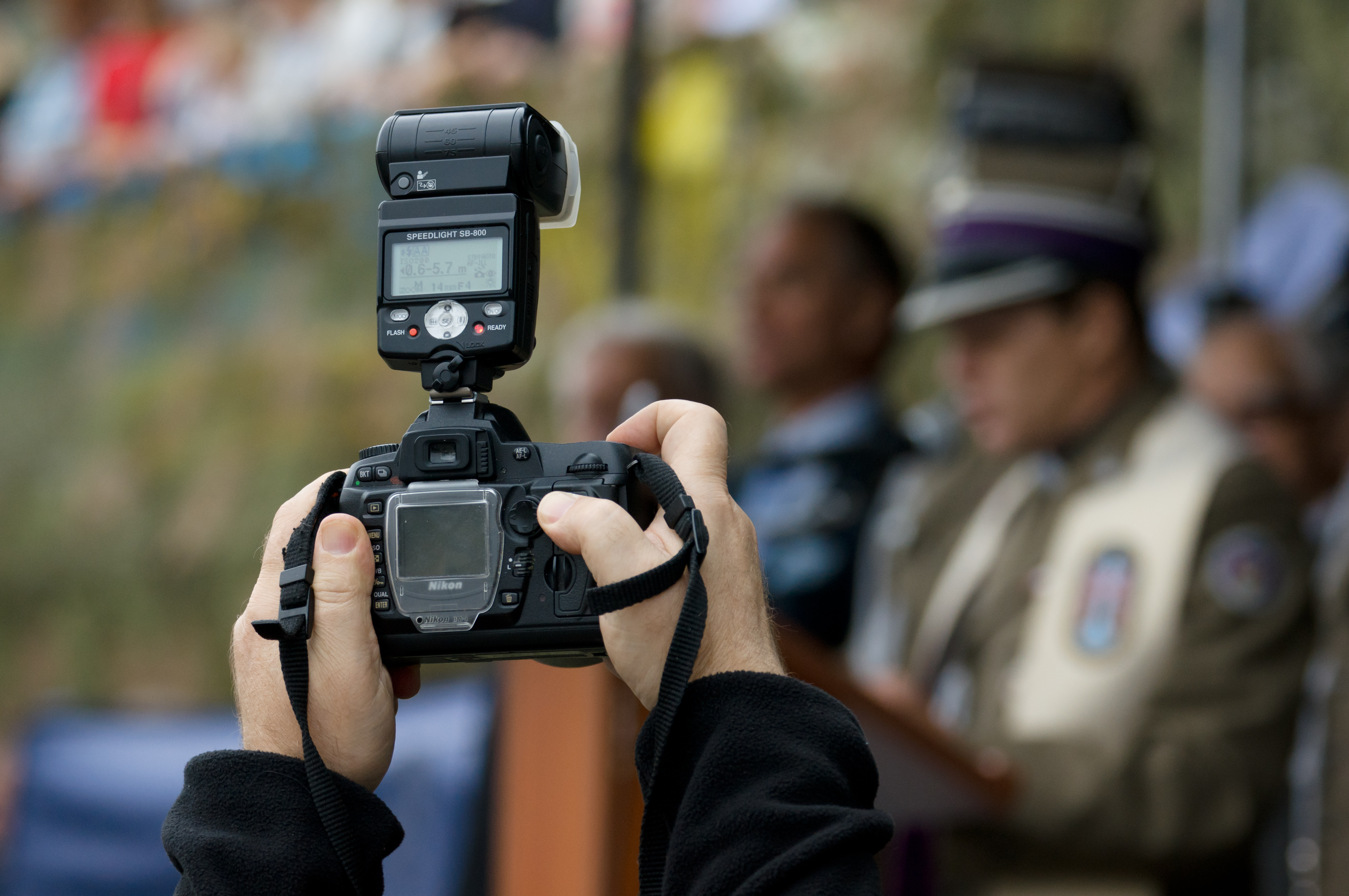 V rekonstrukcja Bitwy o Mławę - inscenizacja nalotu na miasto.